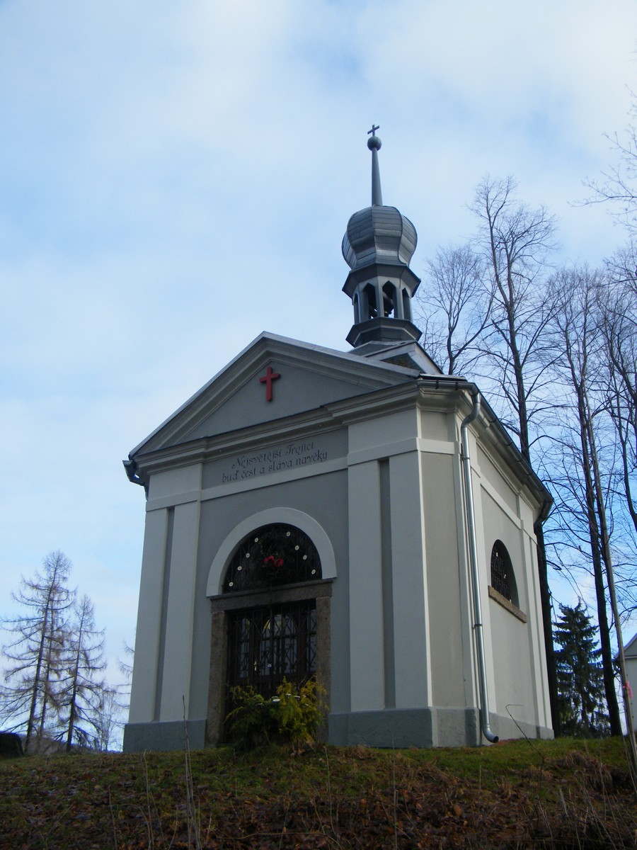 Kaple Nejsvětější Trojice na Křížovém vrchu v Brtníkách